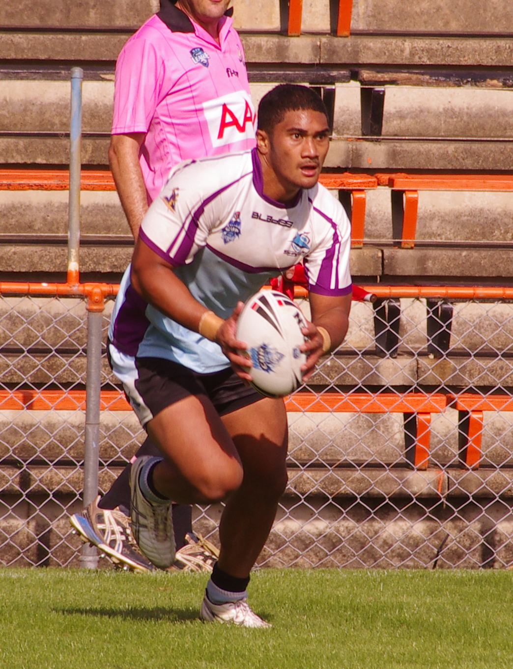 Ricky leutele